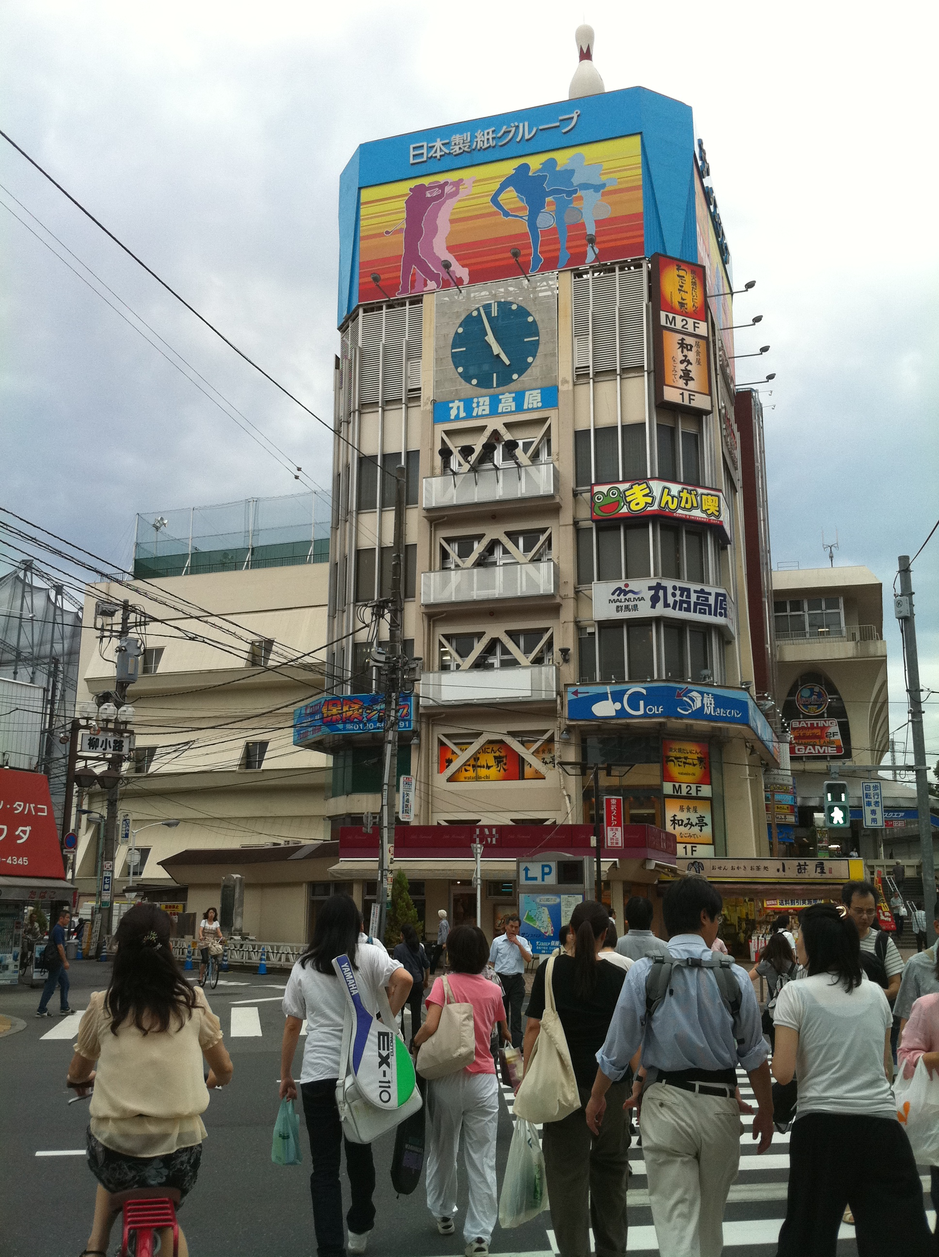 Back Camera [1] 王子サンスクエア 柳小路 [2] おせん・おかき・お茶 小藤屋